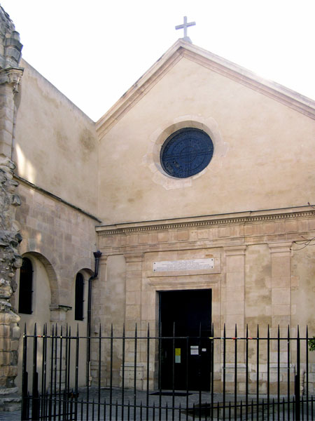 Saint Julien le Pauvre, Paris